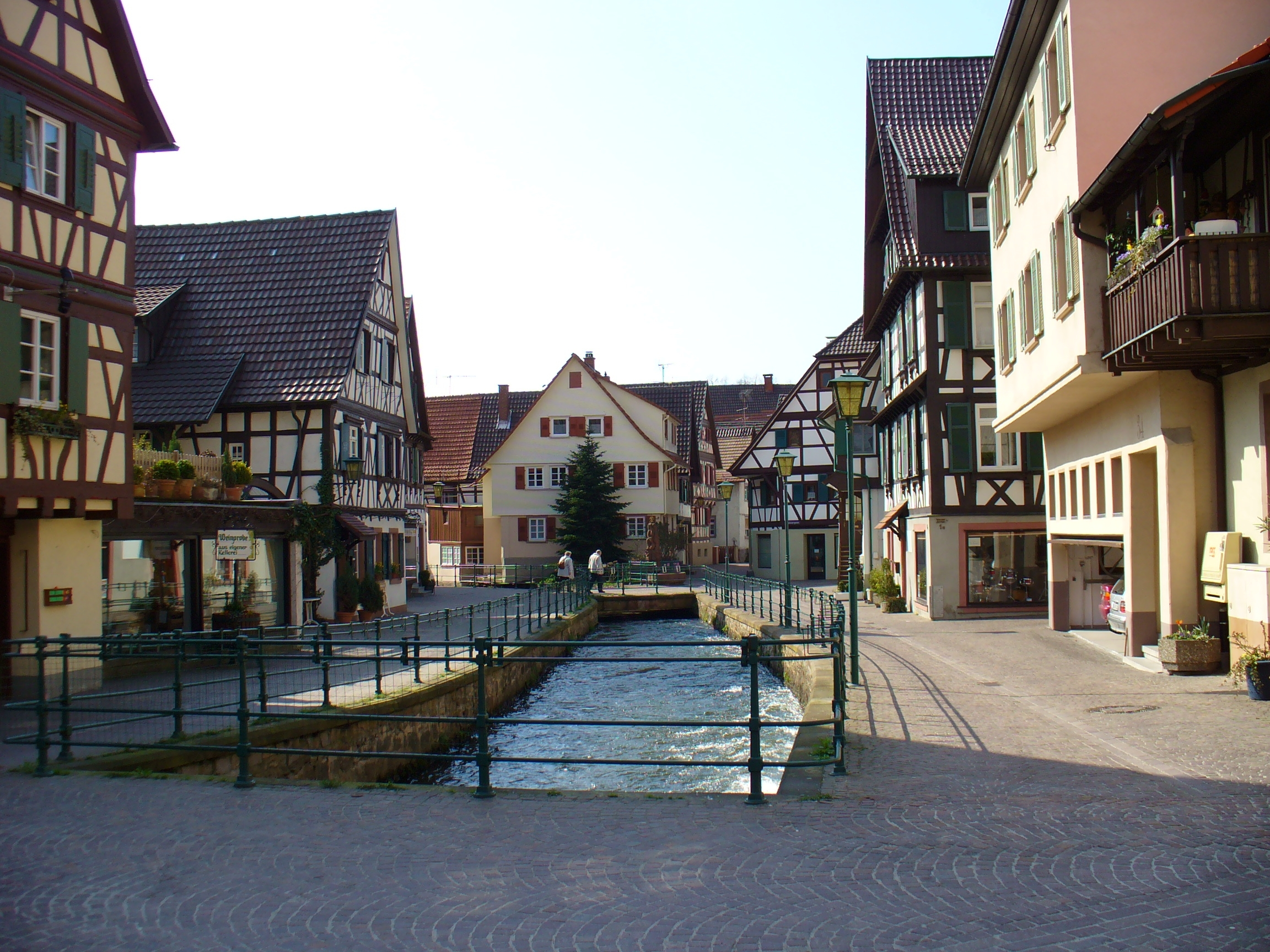 Beschreibung / description: Innenstadt und Mühlbach in Oberkirch, Deutschland / City centre Oberkirch and Mühlbach, Germany Quelle / source: selbst fotografiert am / self made at 03. April 2005 Fotograf / photographer: User:Kerish Lizenz / licence